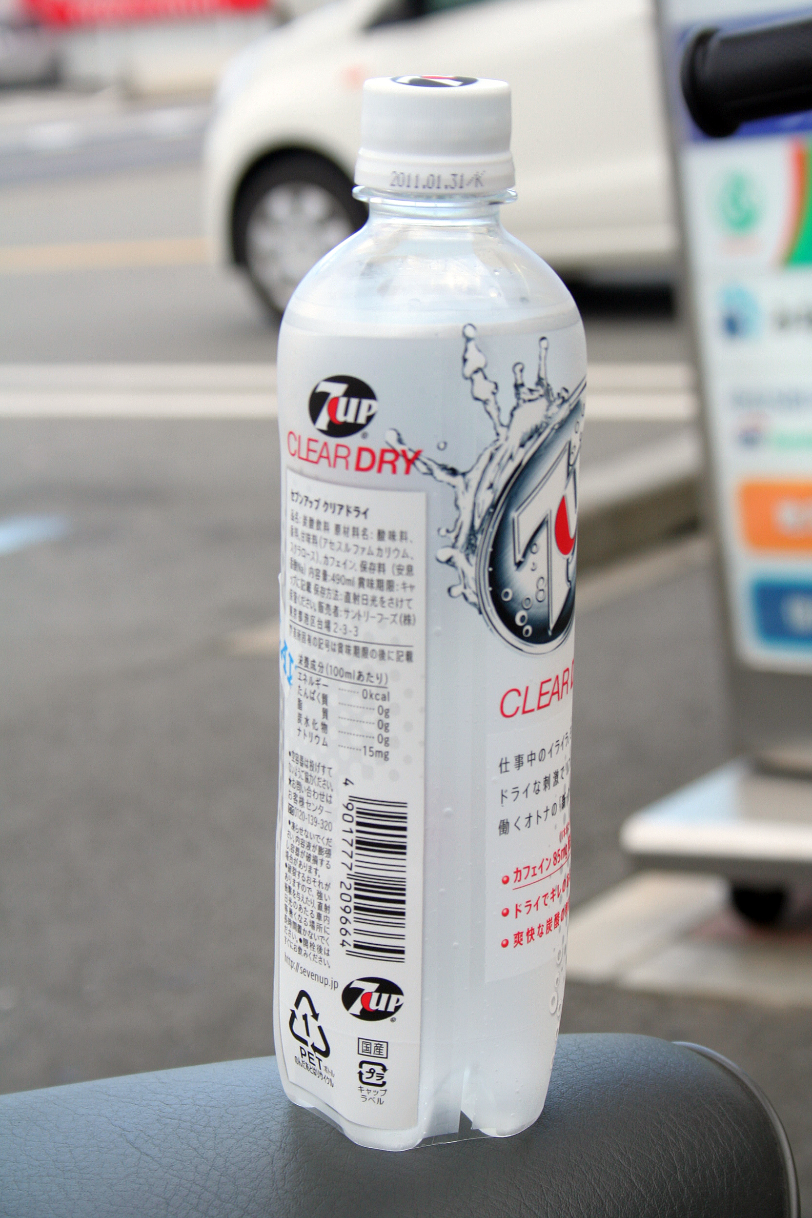 主に姫路市内の店舗の画像。そして飲食物。 セブンアップの清涼飲料。クリアドライ490ml。